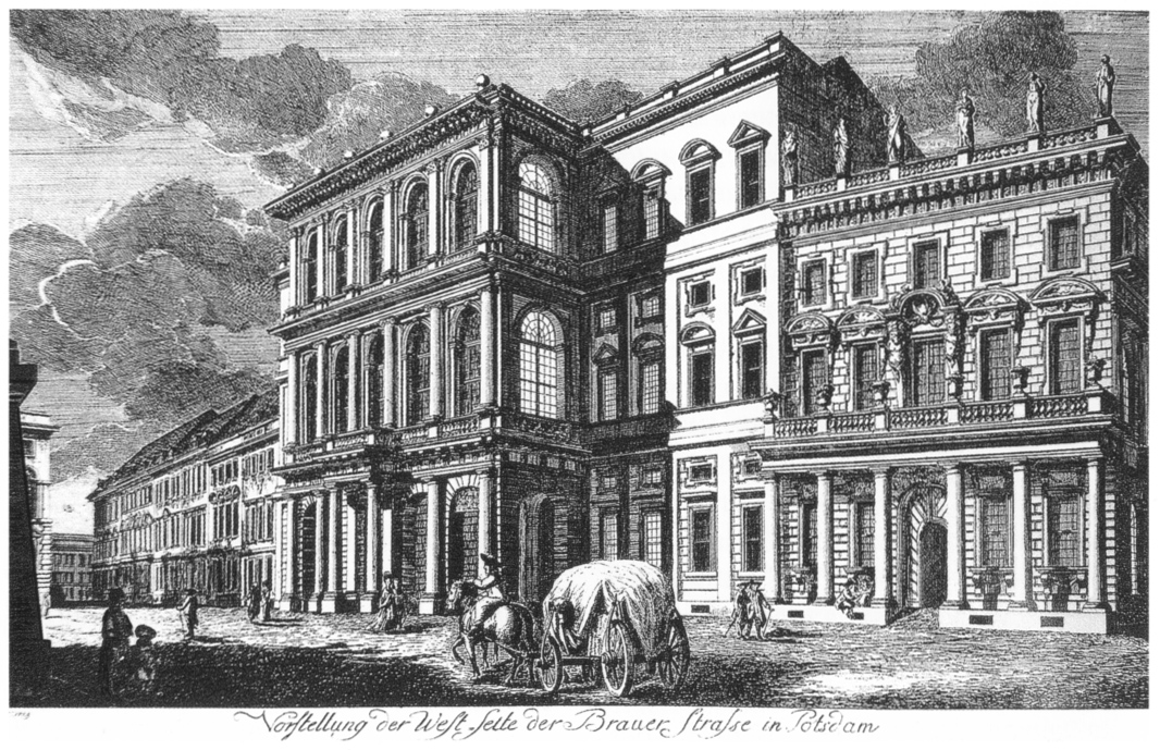 "Vorstellung der West-Seite der Brauer Straße in Potsdam"